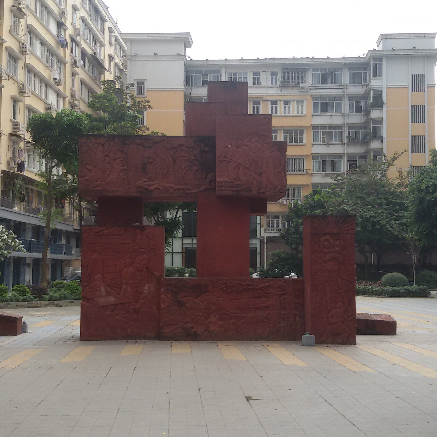 粵語: 洲頭咀反租地抗英鬥爭紀念碑